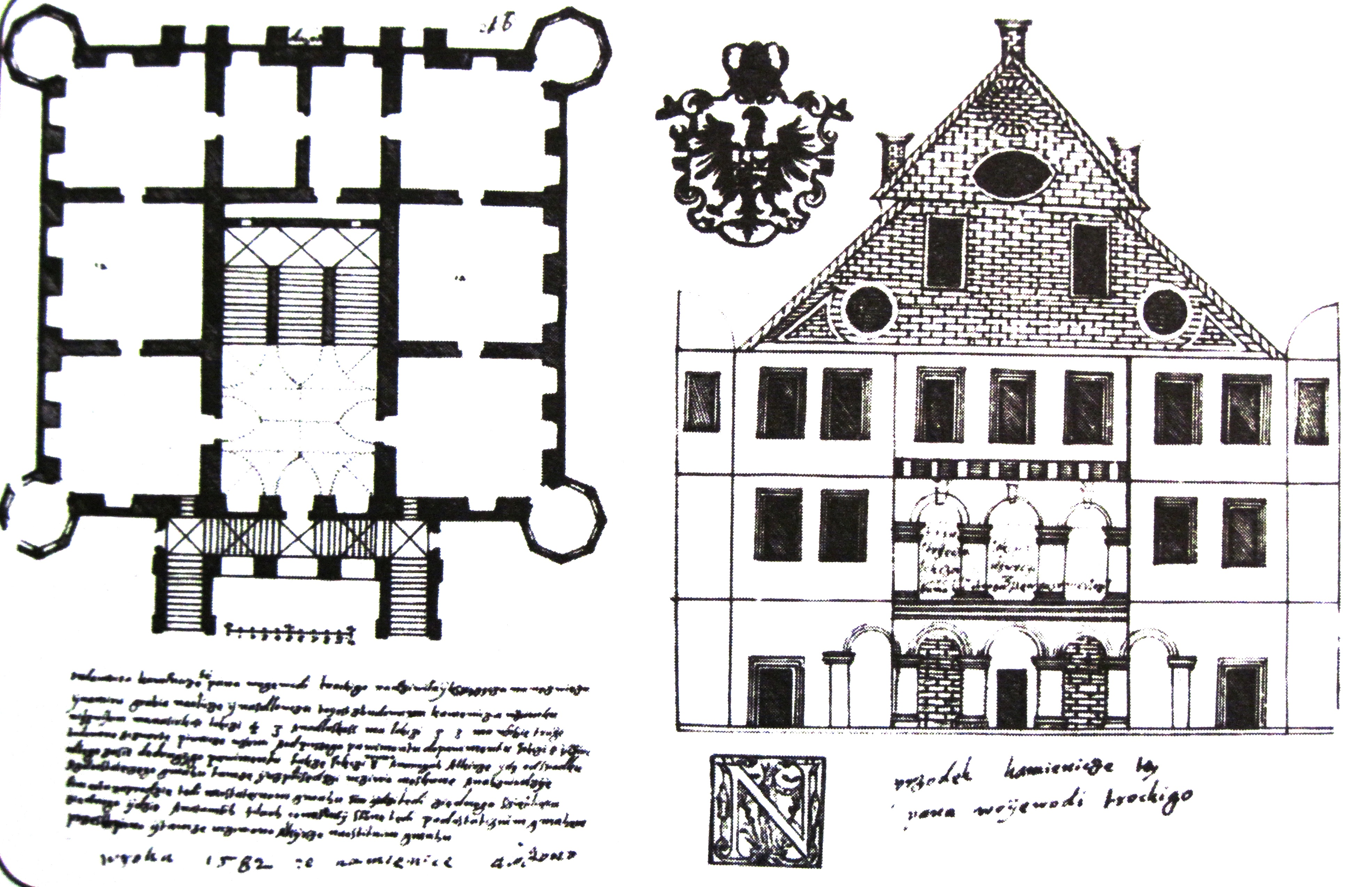 Беларуская (тарашкевіца): Плян палаца ў замку М.К. Сіроткі ў Нясвіжу, 16ст.